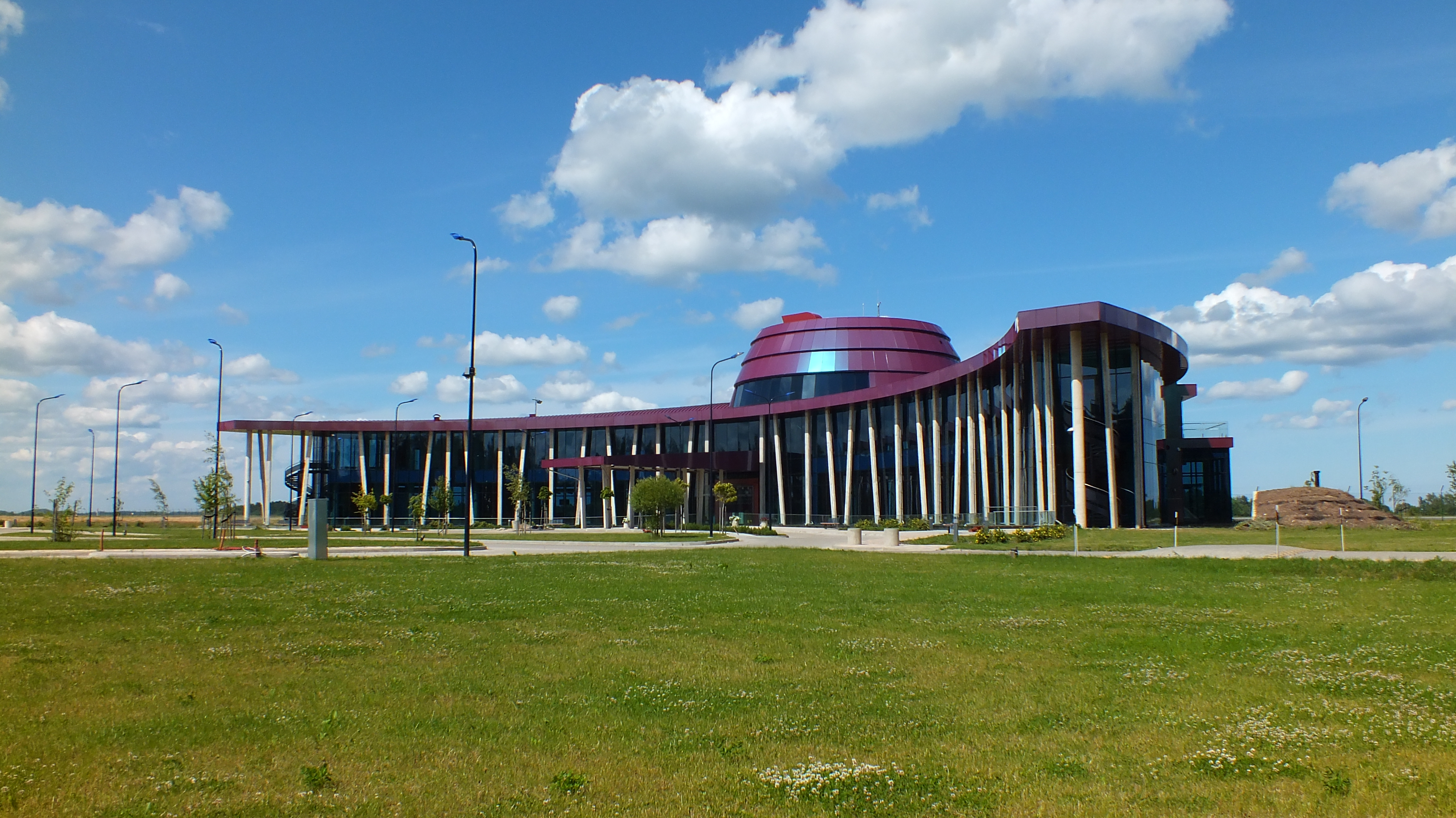 Jūrmalas lidostas terminālis (SE)